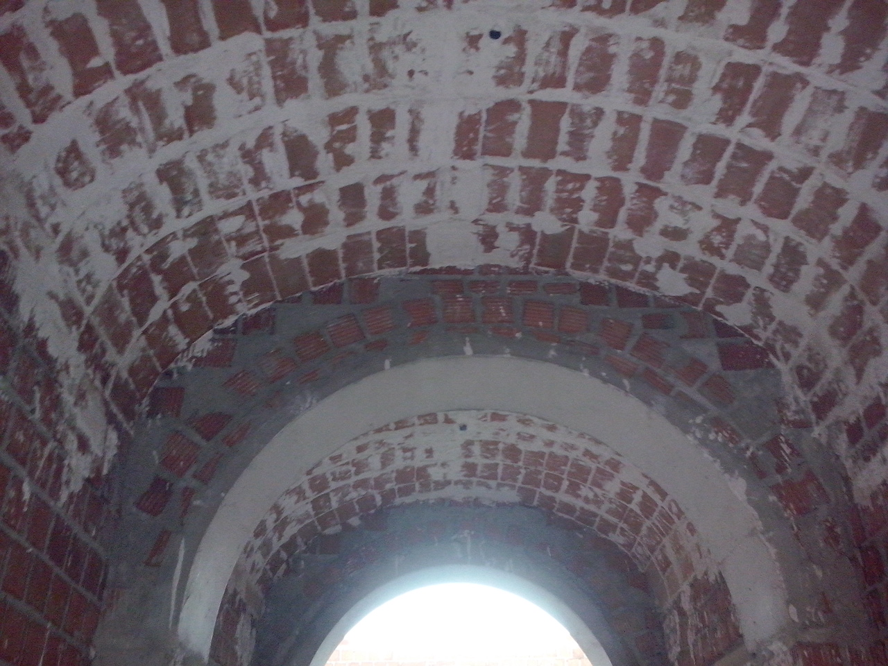 Boveda tabicada de cañón eliptica